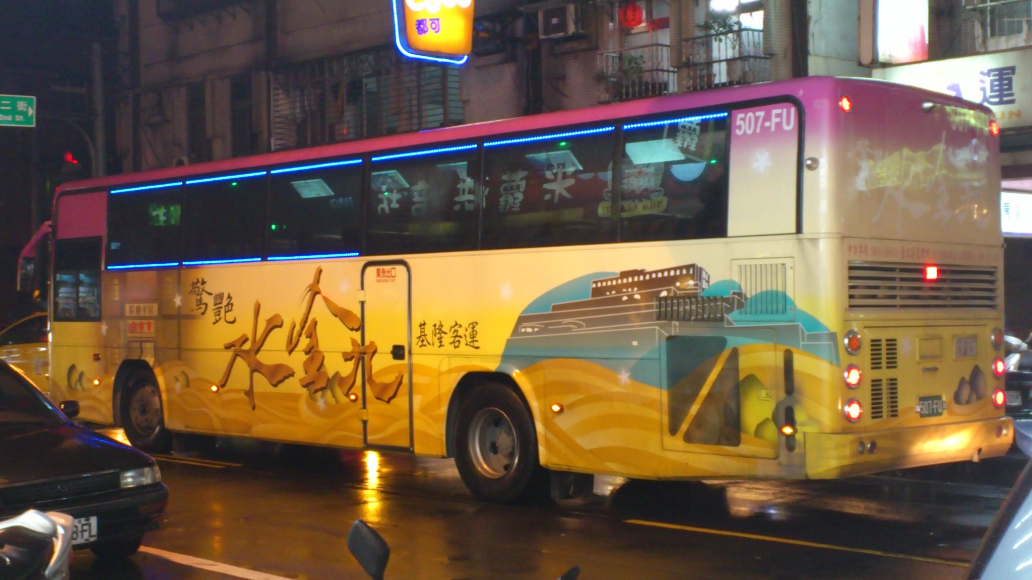 基隆客運日野RK8JRSA「驚豔水金九」光雕公車507-FU左側夜間外觀。